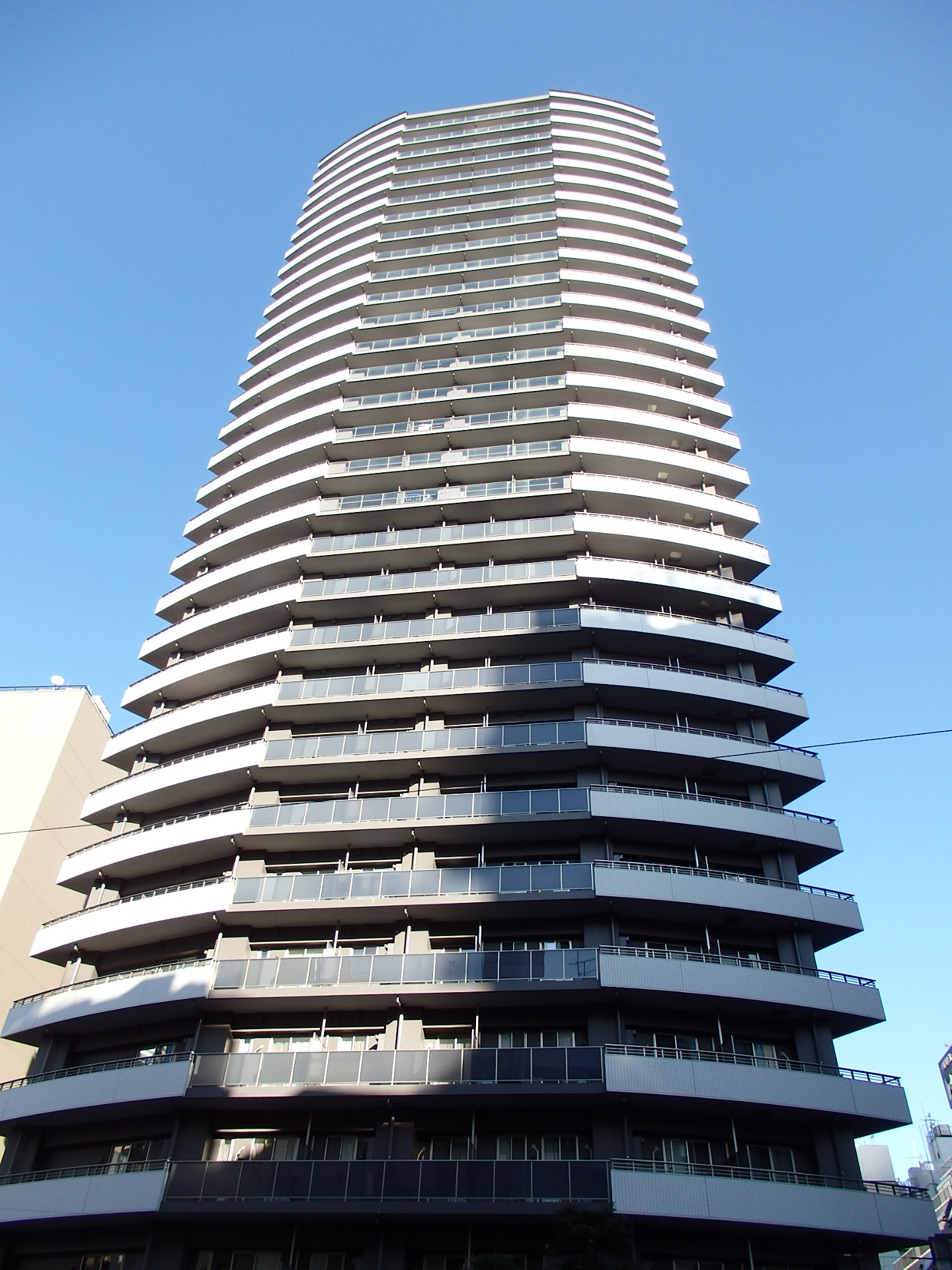 ルミナリータワー池袋